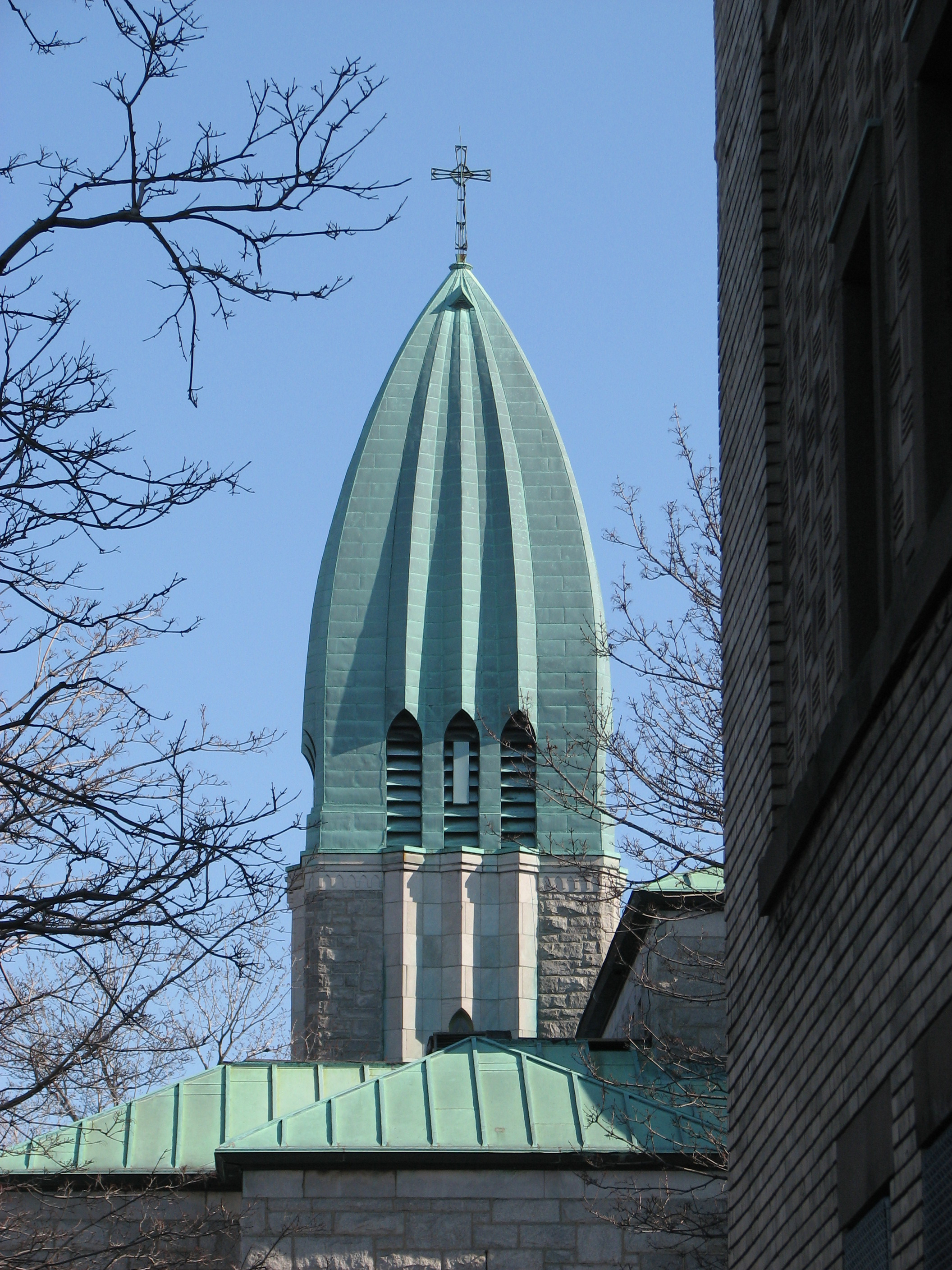 Clocher de l'église St-Arsène à Montréal